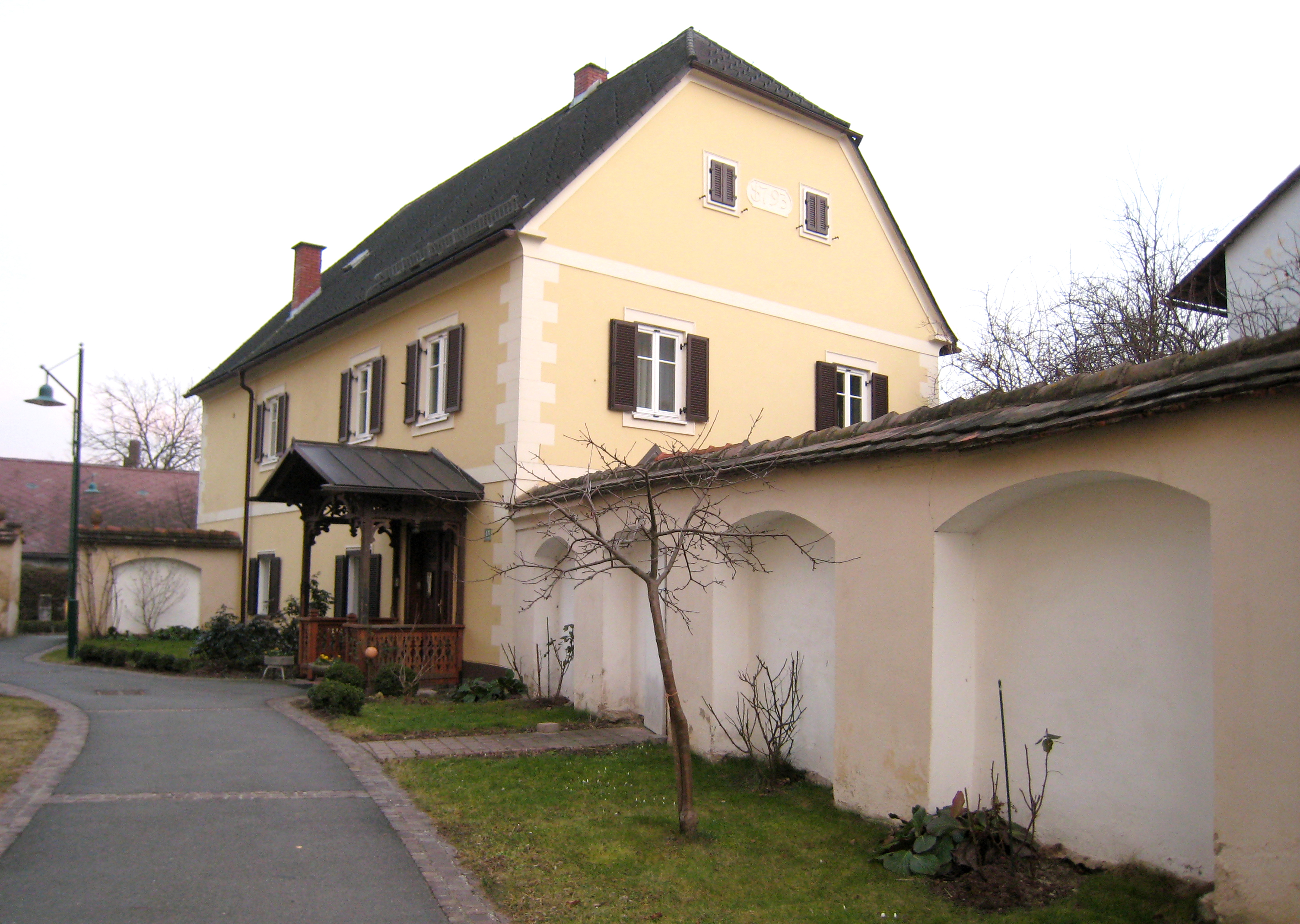 Pfarrhof